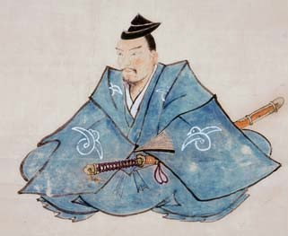 仙台真田氏初代当主・真田守信の肖像画。